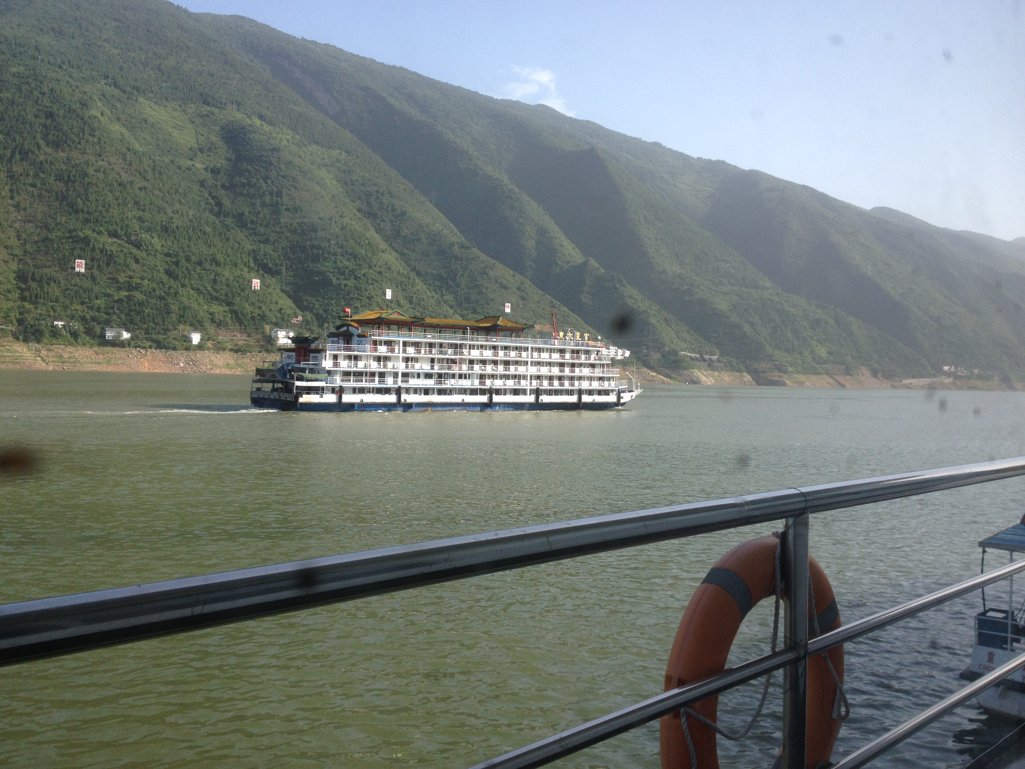 东方皇宫号